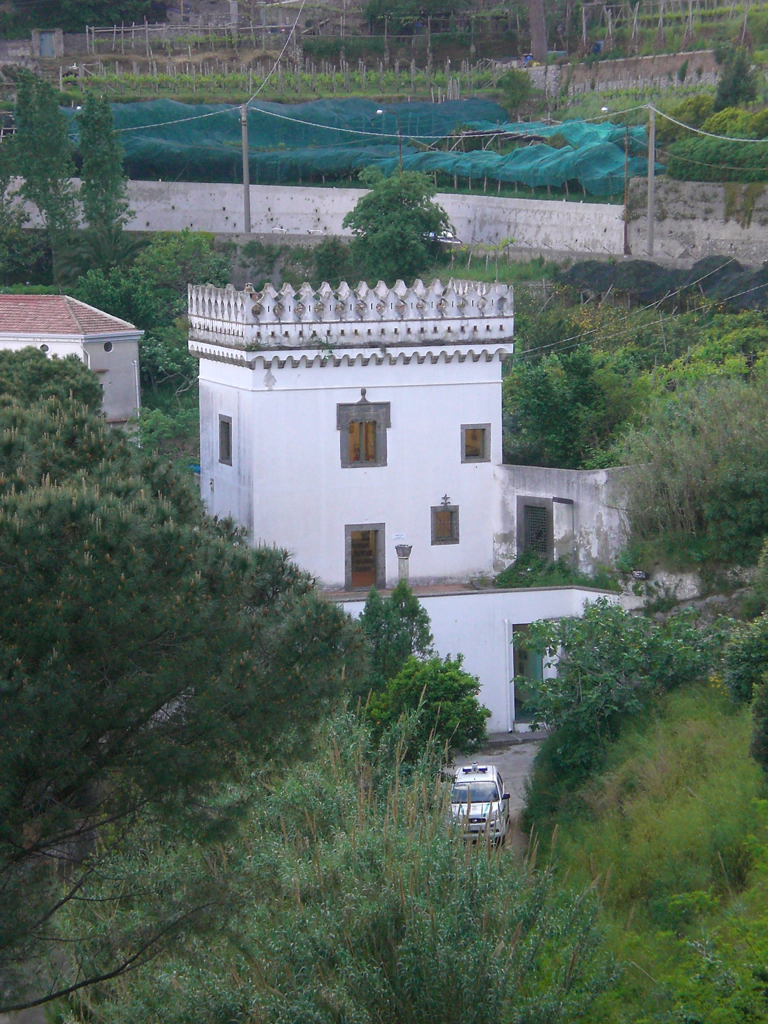 Raito: Torretta Belvedere, sede del Museo della ceramica vietrese